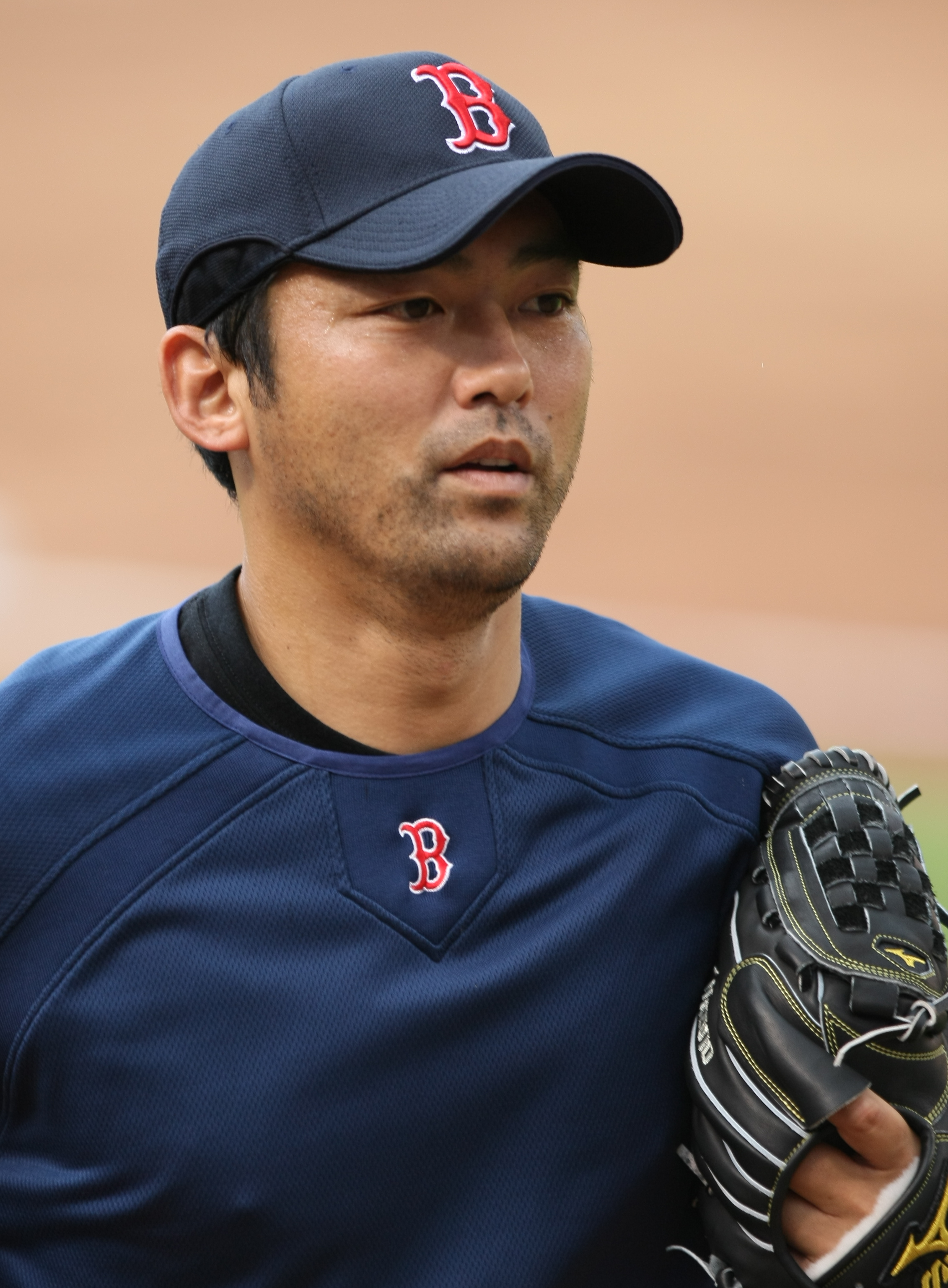 Takashi Saito